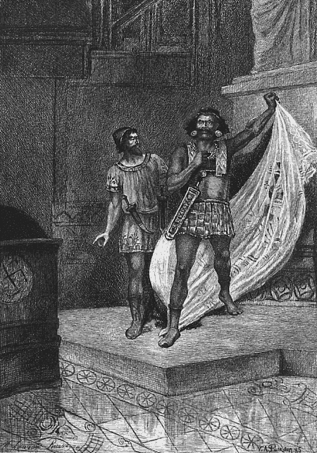 Salammbô, Gustave Flaubert - Il semblait à Spendius de taille plus haute et transfiguré.